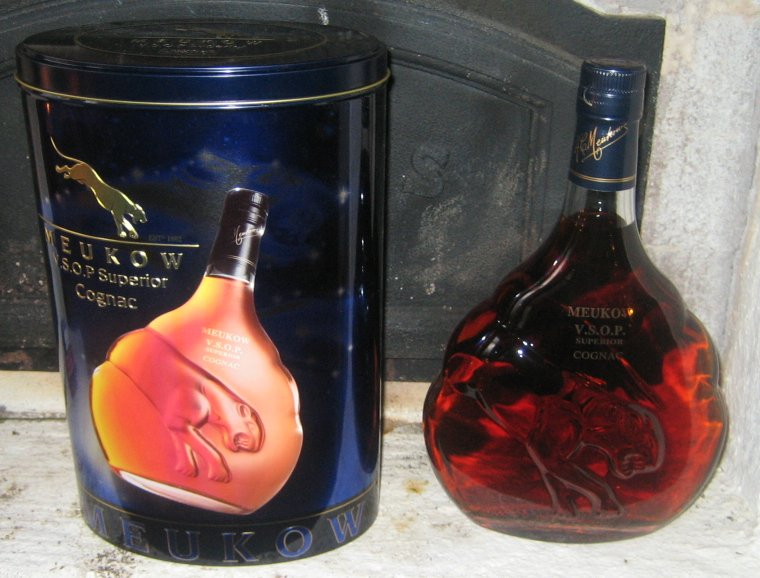 Meukow VSOP Cognac